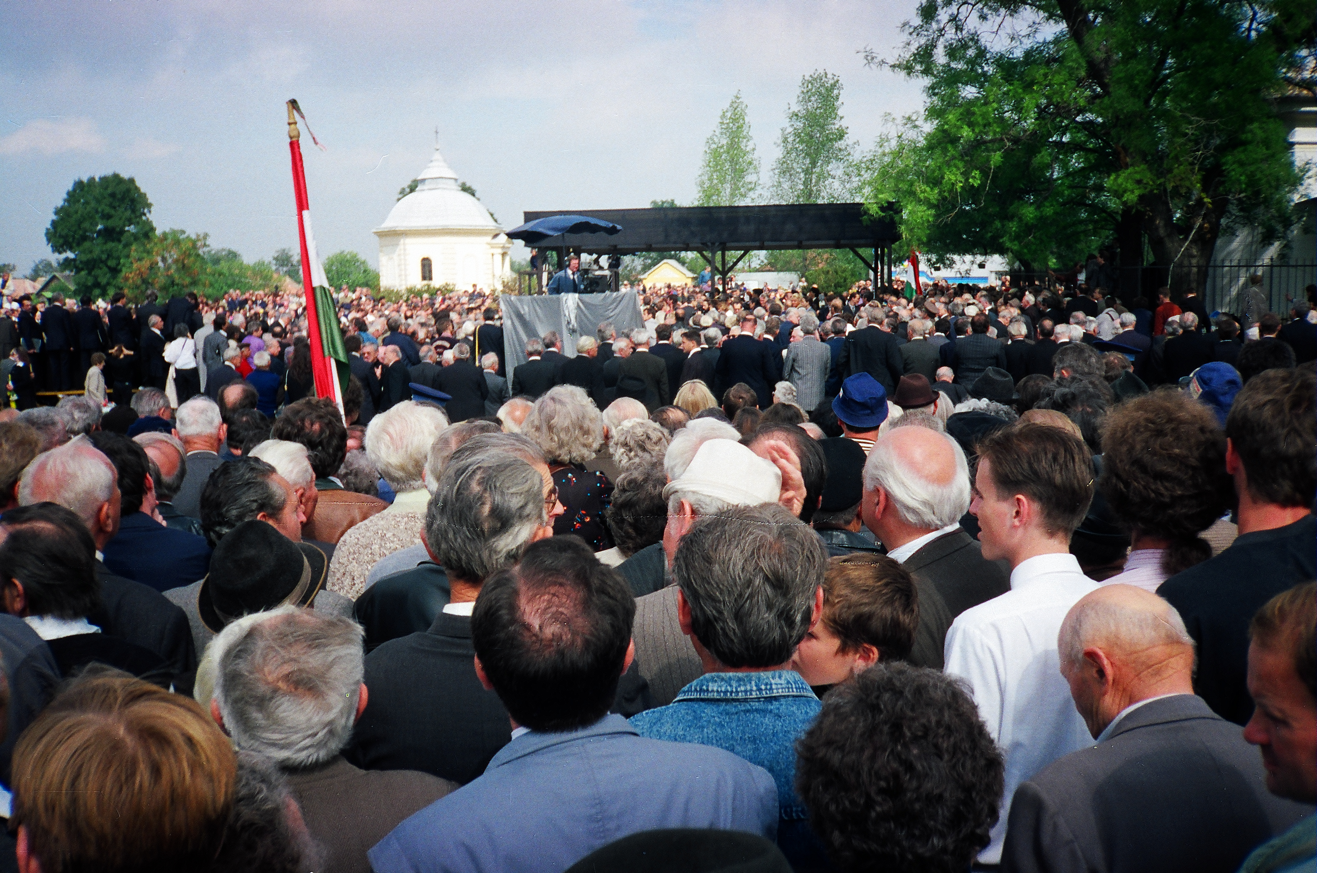 A felvétel 1993. szeptember 4 –én készült Kenderesen. Vitéz nagybányai Horthy Miklós, a Magyar Királyság kormányzója újratemetésén mintegy ötvenezren vettek részt. A család tagjai, Boross Péter, Für Lajos, Surján László, Balsai István, Kádár Béla, Nagy Ferenc József, Szabó Tamás, Torgyán József, Kiss Gyula, Lezsák Sándor, Nahimi Péter, Kónya Imre, Csurka István, Vörös Vince, Gáspár Miklós, Zacsek Gyula, Miklós Árpád, Szilasy György, Király B. Izabella, Horváth Béla, Dénes János, Antall József felesége és fia. Radnóczy Antal, a Vitézi Rend főkapitánya tisztelgett a rendjüket alapító Horthy Miklósnak. Ezt követte Baranyi Mihály polgármester beszéde. Kéri Kálmán nyugalmazott vezérezredes egyre fogyatkozó számú tiszttársa nevében beszélt. Emlékbeszédet tartott Hegedűs Lóránt püspök, a Magyarországi Református Egyház Zsinatának lelkészi elnöke is. Edelsheim-Gyulai Ilona grófnő, néhai Horthy István kormányzó helyettes felesége köszönetet mondott azoknak, akik az újratemetést lehetővé tették, s tisztelegtek az elhunyt emléke előtt. Ifjabb Horthy István felidézte nagyapja emlékét. Az újratemetés záróaktusaként a gyülekezet elénekelte a Himnuszt. Források: Gr. Edelsheim Gyulai Ilona Horthy István kormányzóhelyettes özvegye: Becsület és kötelesség I-II. Bp.,1998, Szöts Zoltán Oszkár: A rendszerváltás nyomtatott sajtója és Horthy Miklós újratemetése (1989–1994) [1], Gondolatok Horthy Miklósról (válogatás, második kiadás) Horthy Miklós újratemetése (1-6) Horthy Miklós újratemetése Kenderesen [2], 1993: magánember-miniszterekkel temetik újra Horthy Miklóst The Soldier Who Saved the Lives of Budapest ’s : Col. Ferenc Koszorús [3], Koszorús Ferenc Emlékiratai és Tanulmányainak Gyűjteménye, Sajtó alá rendezte: Koszorús Ferenc özvegye, Varsa Istvánné, Kiadta: Magyar Történelmi Kutató Társaság, Universe Publishing Company, 1987, ISBN 0-935484-17-5, Varsa István [4] Címkék: Horthy Miklós Kenderes 1993 Metapolisz